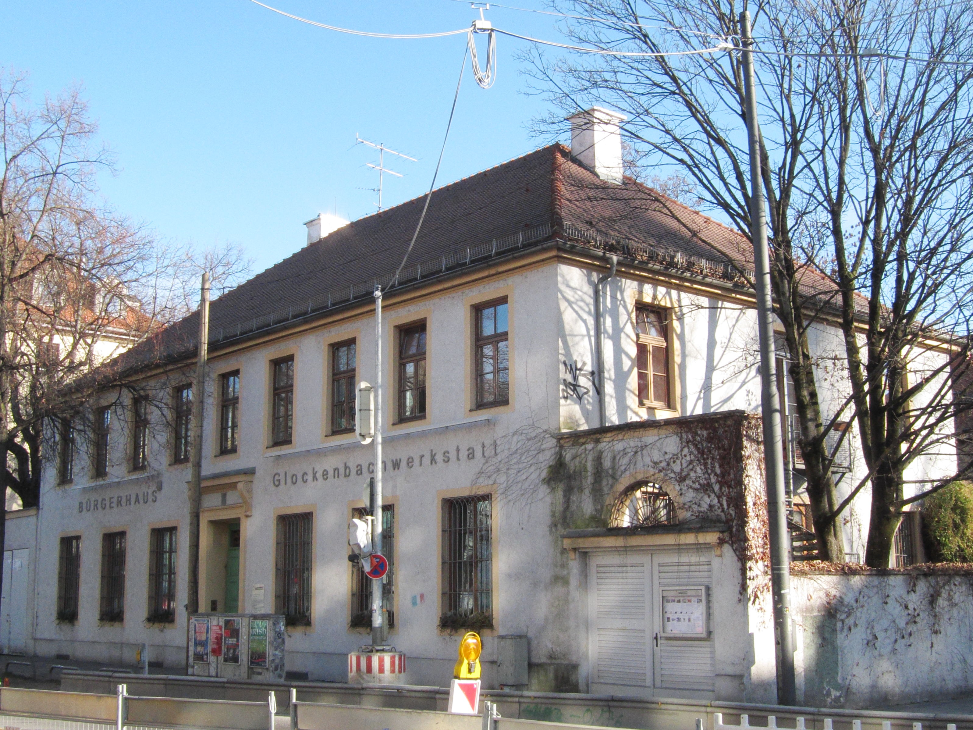 Blumenstraße 7; Wohnhaus, ehem. viergeschossiger klassizistischer Walmdachbau, um 1826, nach Kriegsschäden von Reinhard Riemerschmid 1948 reduziert wiederaufgebaut; rechts anschließend Tor in klassizistischen Formen.